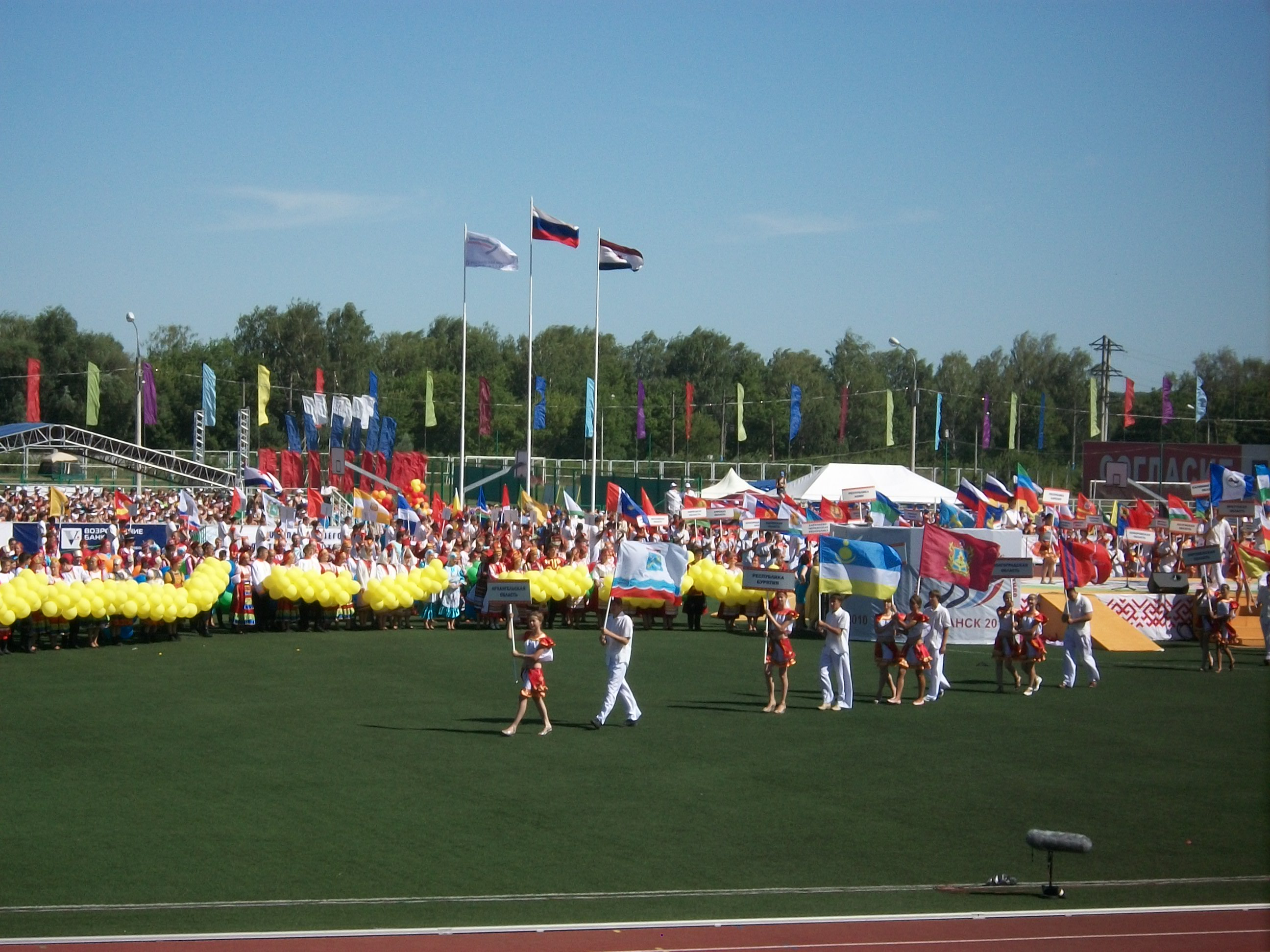 Открытие чемпионата России по лёгкой атлетике. Стадион «Старт» (город Саранск, Республика Мордовия). Июль 2010 года.